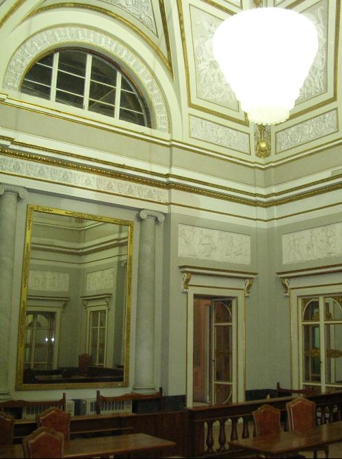 Livorno: interno del Palazzo de Larderel (XIX secolo). Sala da ballo.